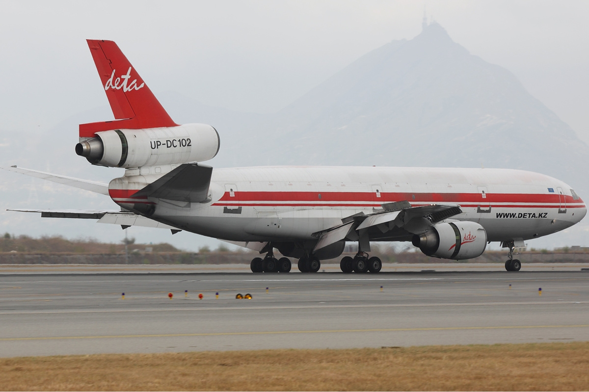 Deta Air McDonnell Douglas DC-10-40(F)